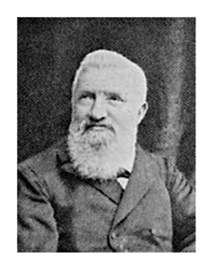 Carl Friedrich Heman (1839-1919), geboren in Grünstadt, Philosophieprofessor in Basel